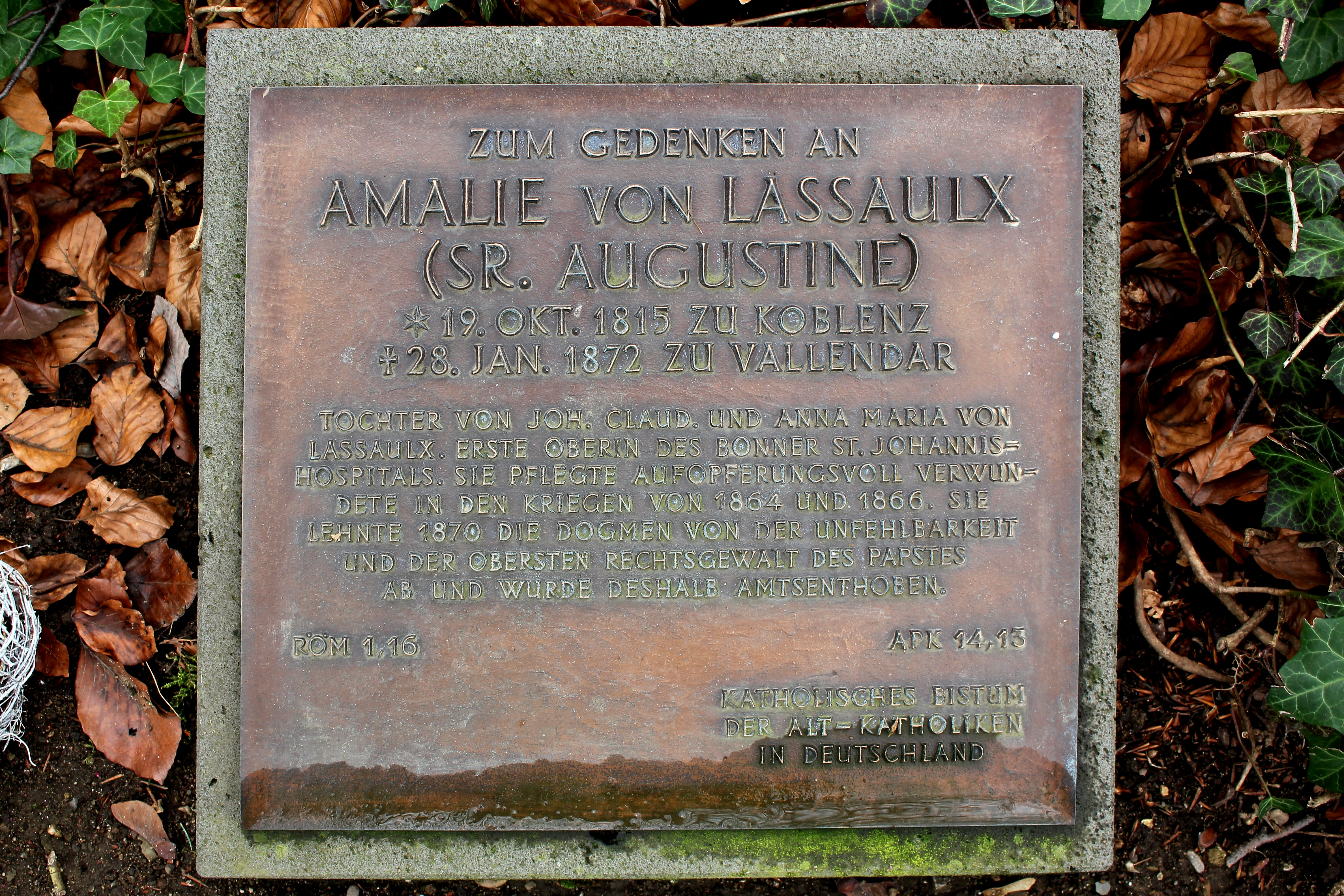 Gedenkplatte für Amalie Lassaulx in Weißenthurm. Sie war Oberin des St.-Johannis-Hospitals in Bonn. Wegen ihrer Ablehnung zweier Dogmen des Papstes wurde sie ihres Amtes enthoben.